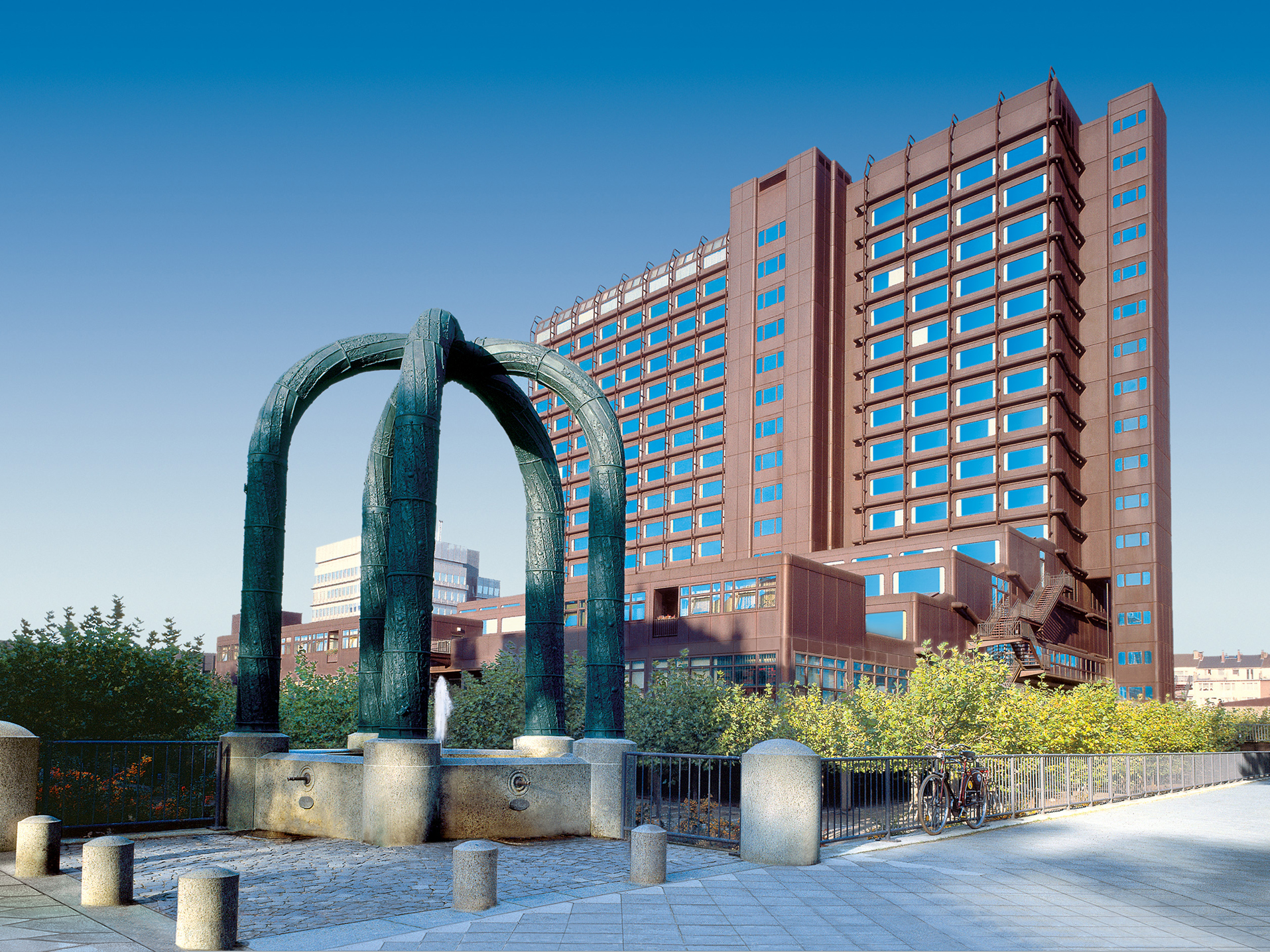 Hauptgebäude des Landesbetriebes Information und Technik Nordrhein-Westfalen (IT.NRW), Düsseldorf, Deutschland — Architekt: Gottfried Böhm